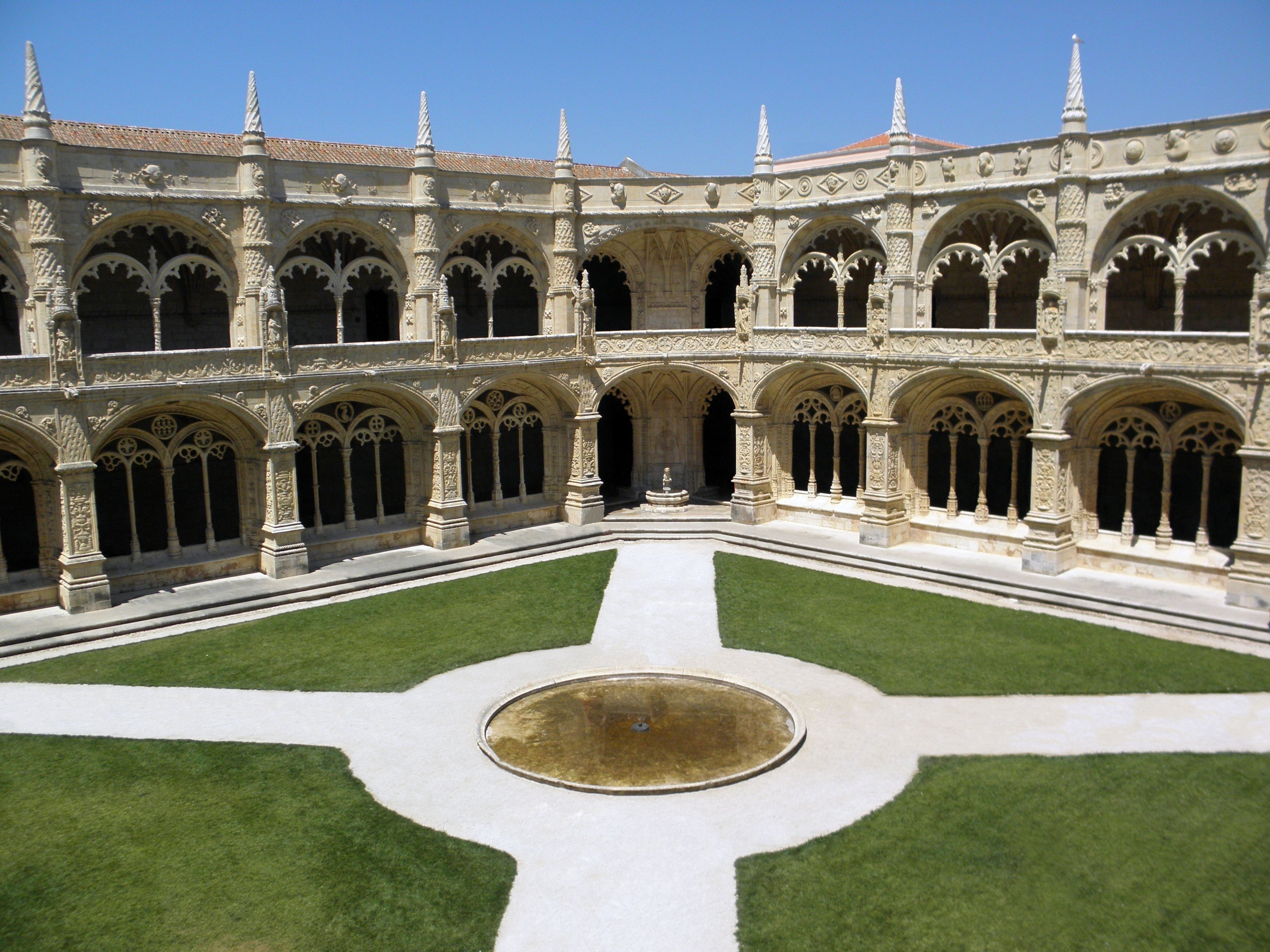 interior del convento de los Jerónimos, situado en Lisboa, muy cerca de la torre de Belem.